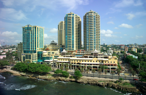 Malecón Center